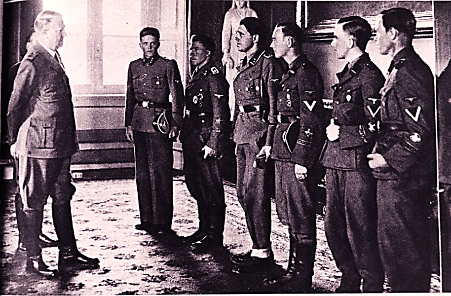 ukjent datering RA/PA-1193/V/0001 (1084)